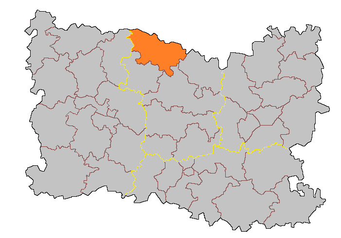 Кантон Бретёй на карте департамента Уаза